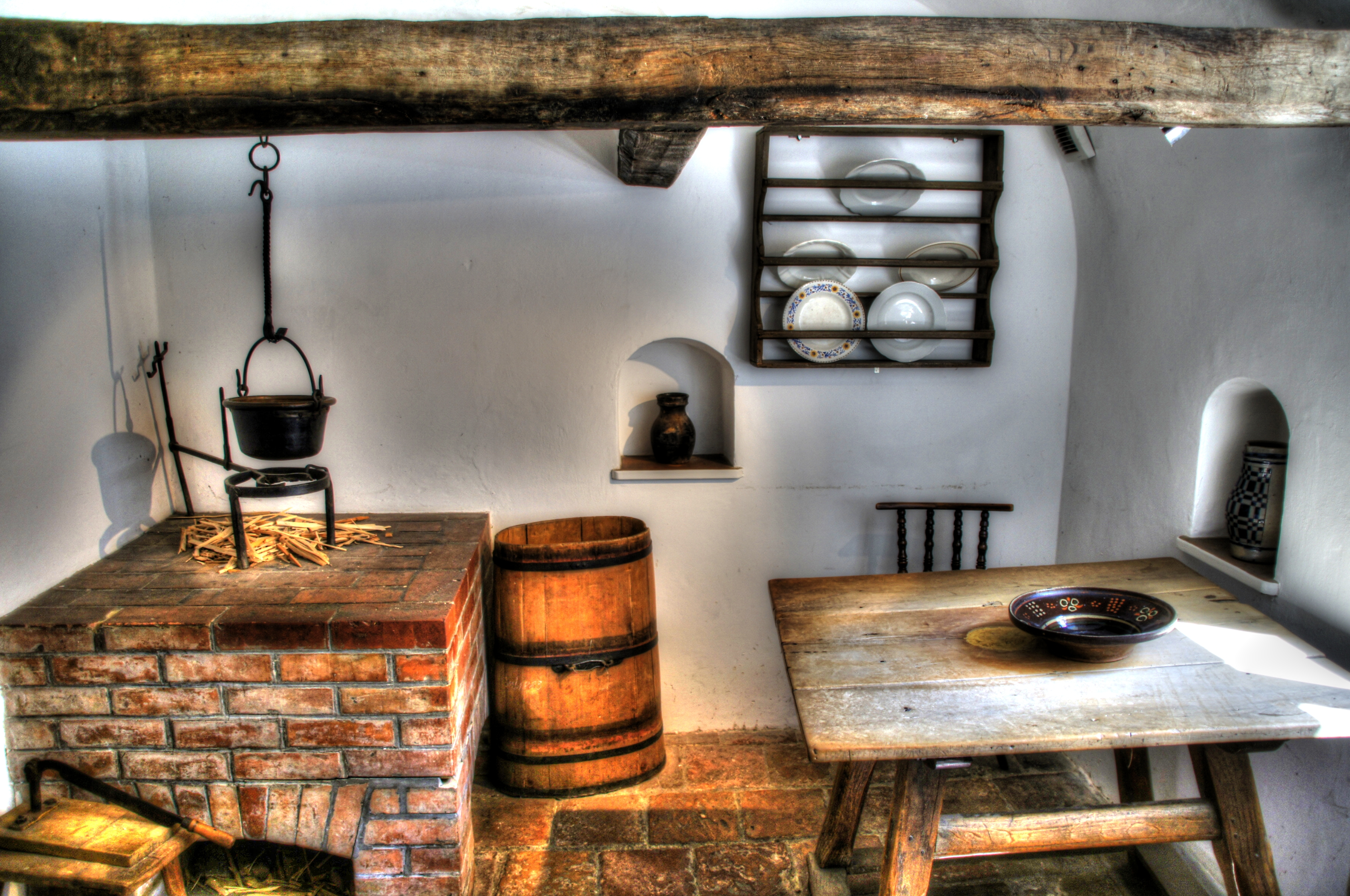 Die 1521 von Jacob Fugger dem Reichen gestiftete Reihenhaussiedlung ist die älteste Sozialsiedlung der Welt. Noch heute wohnen da bedürftige katholische Augsburger Bürger für eine Wohnungsmiete von unter einem Euro (88 Cent). The 1521 by Jacob Fugger the Rich donated row house is the oldest social settlement in the world. Today as Catholic needy citizens of Augsburg stay for an apartment rent of less than one euro (88 cents). Die Stadt wurde 15 v. Chr von Kaiser Augustus als Castro gegründet. Der Name Augsburg geht auf die spätere römische Provinzhauptstadt Augusta Vindelicorum oder Augusta Vindelicum zurück. Augsburg gehört damit zu den ältesten Städten Deutschlands. The city was founded in 15 BC by Emperor Augustus as Castro. The name goes back to the later Roman provincial capital Vindelicorum Augusta or Augusta Vindelicum. Augsburg is one of the oldest cities in Germany.